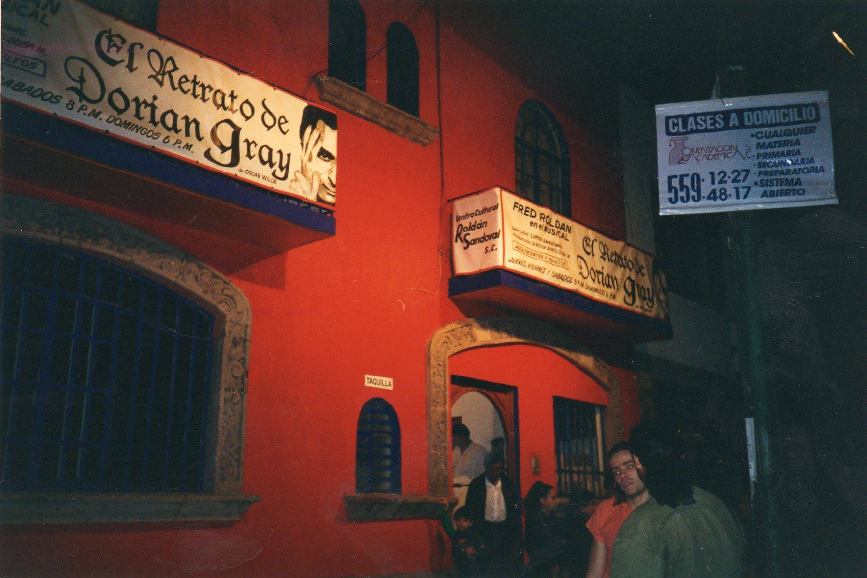 Fotografía original del Centro Cultural Roldán Sandoval